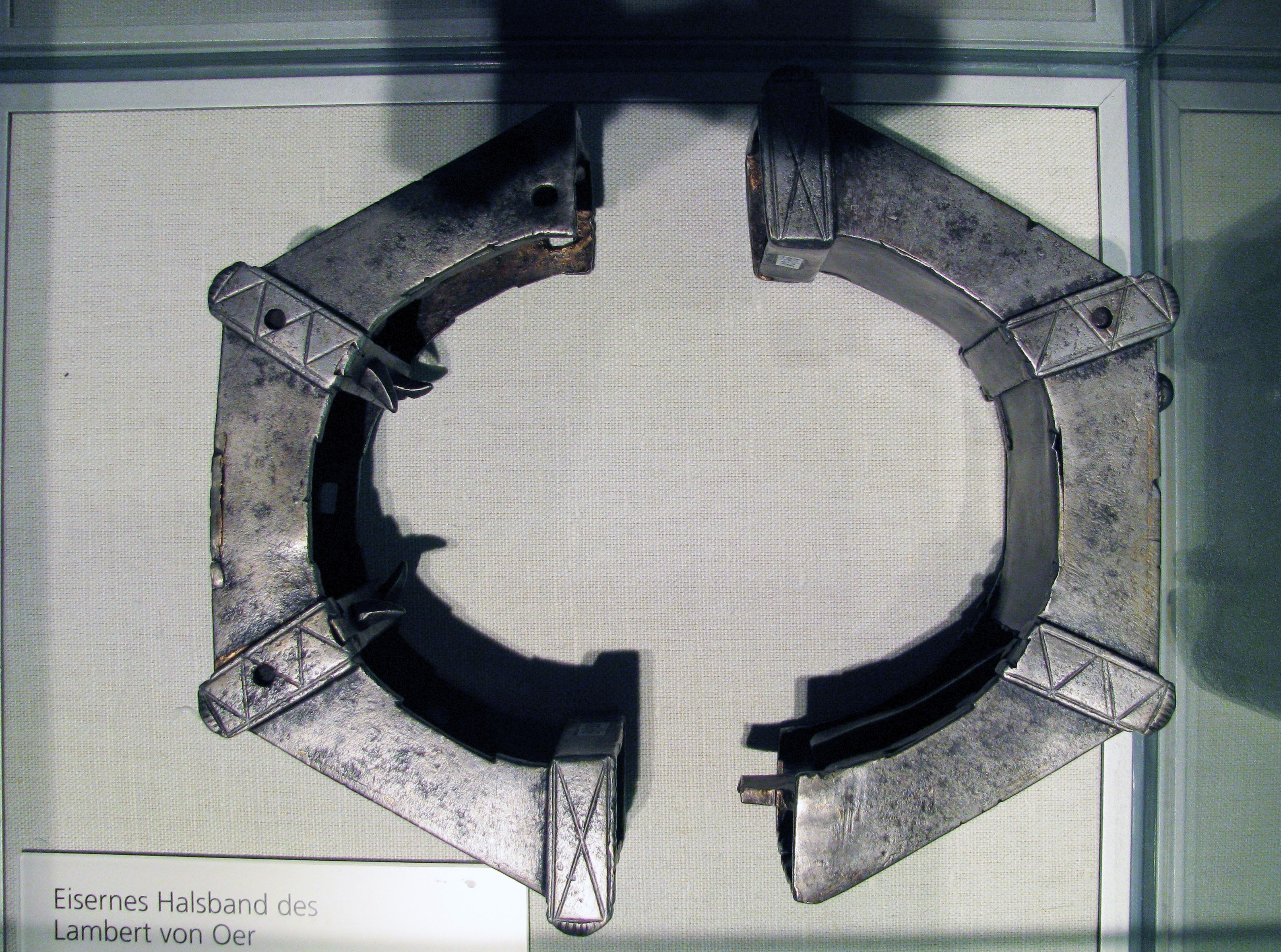 Das eiserne Halsband des Ritters Lambert von Oer, Folterinstrument [1]